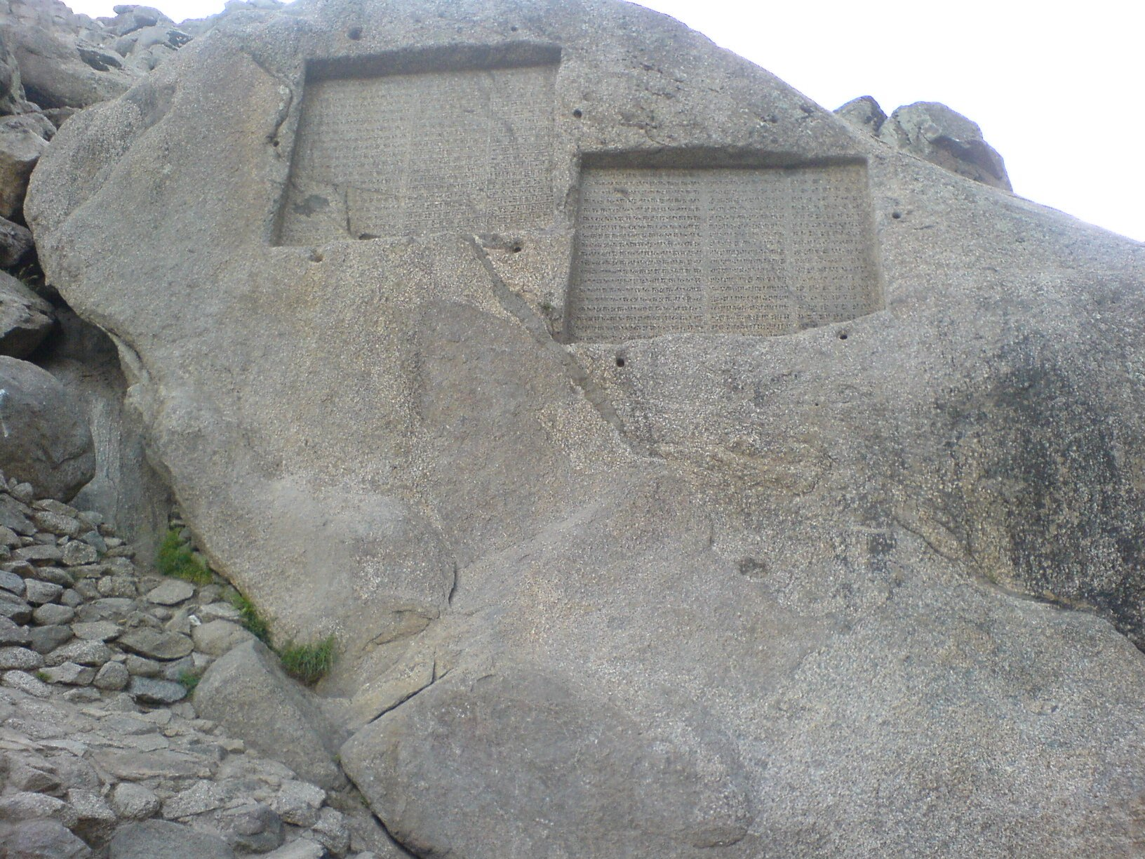 == شرح ==